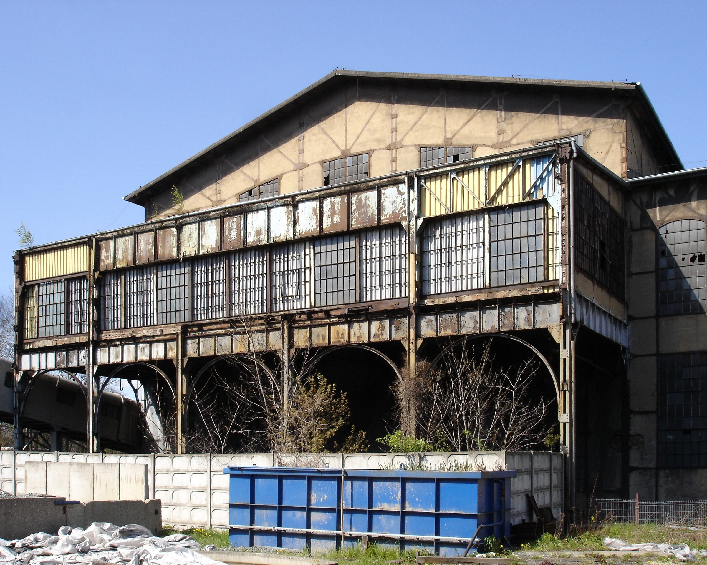 zabudowania kopalni węgla kamiennego Jowisz w Wojkowicach